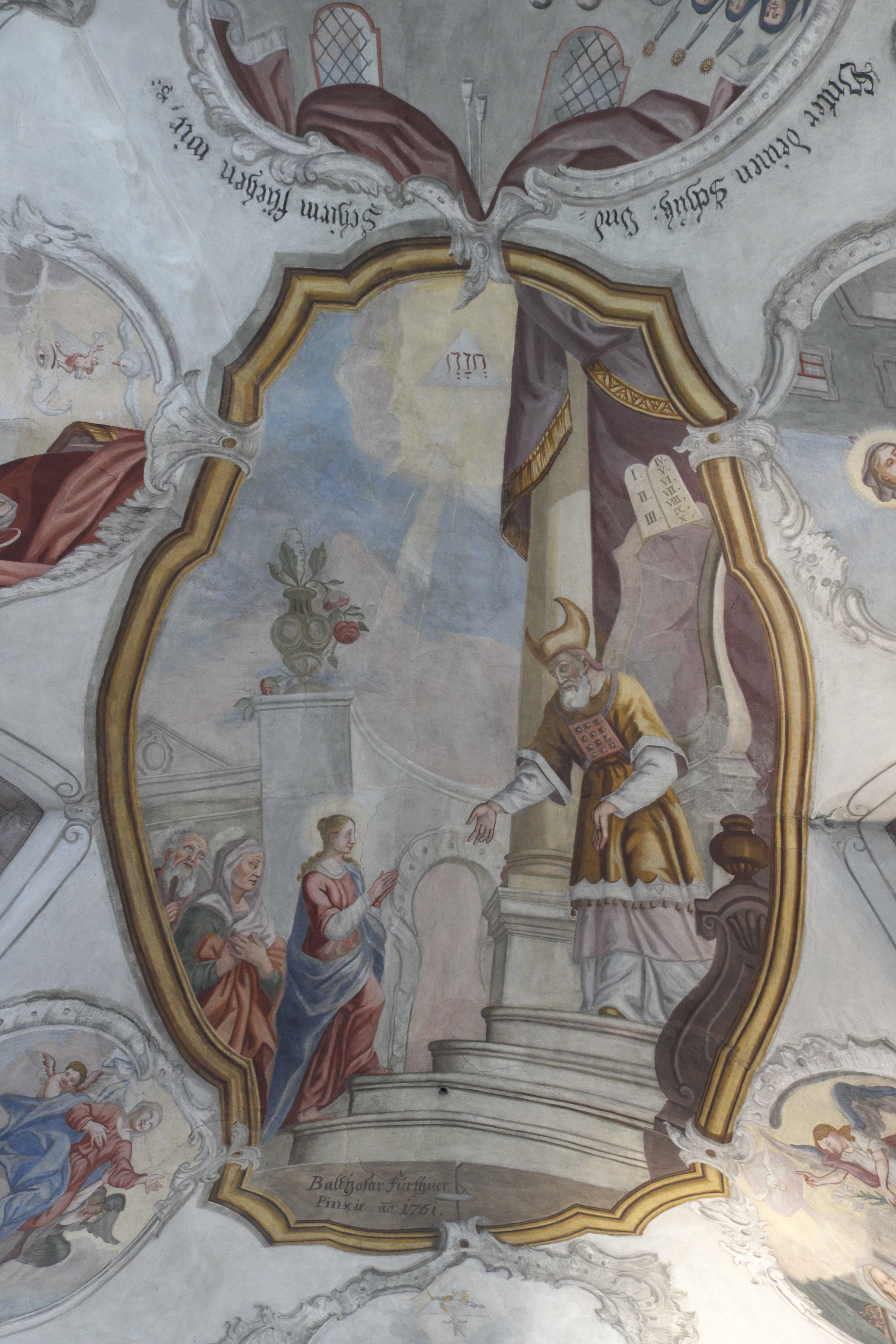 Katholische Abtei- und Kuratiekirche Mariä Opferung des Benediktinerinnenklosters Frauenchiemsee auf der Fraueninsel im Landkreis Rosenheim (Bayern/Deutschland), Deckenmalerei von Balthasar Fürthner, von 1761